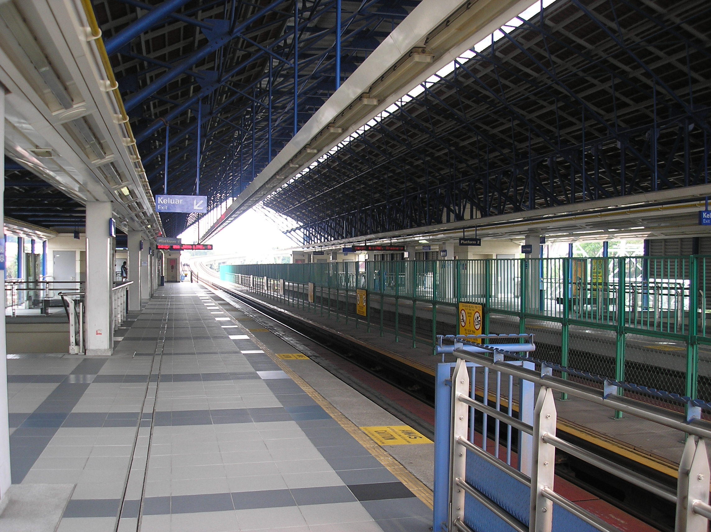 The Taman Bahagia LRT station (Kelana Jaya Line), Petaling Jaya, Selangor, Malaysia.